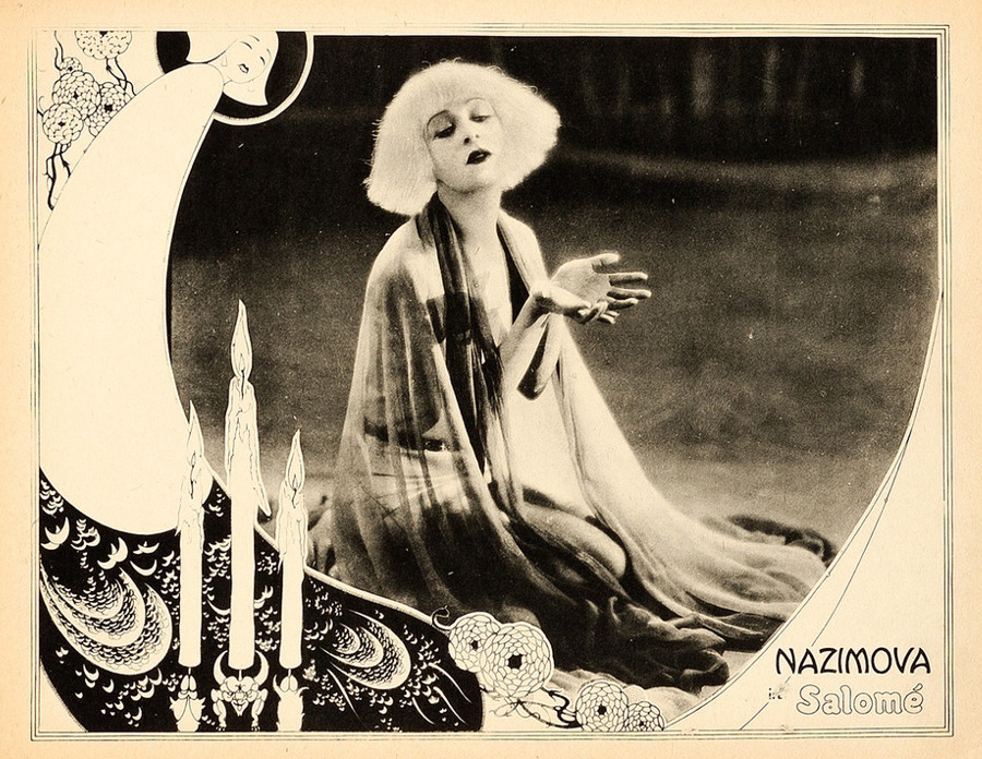 Salomé is a 1923 American silent drama film starring Nazimova.